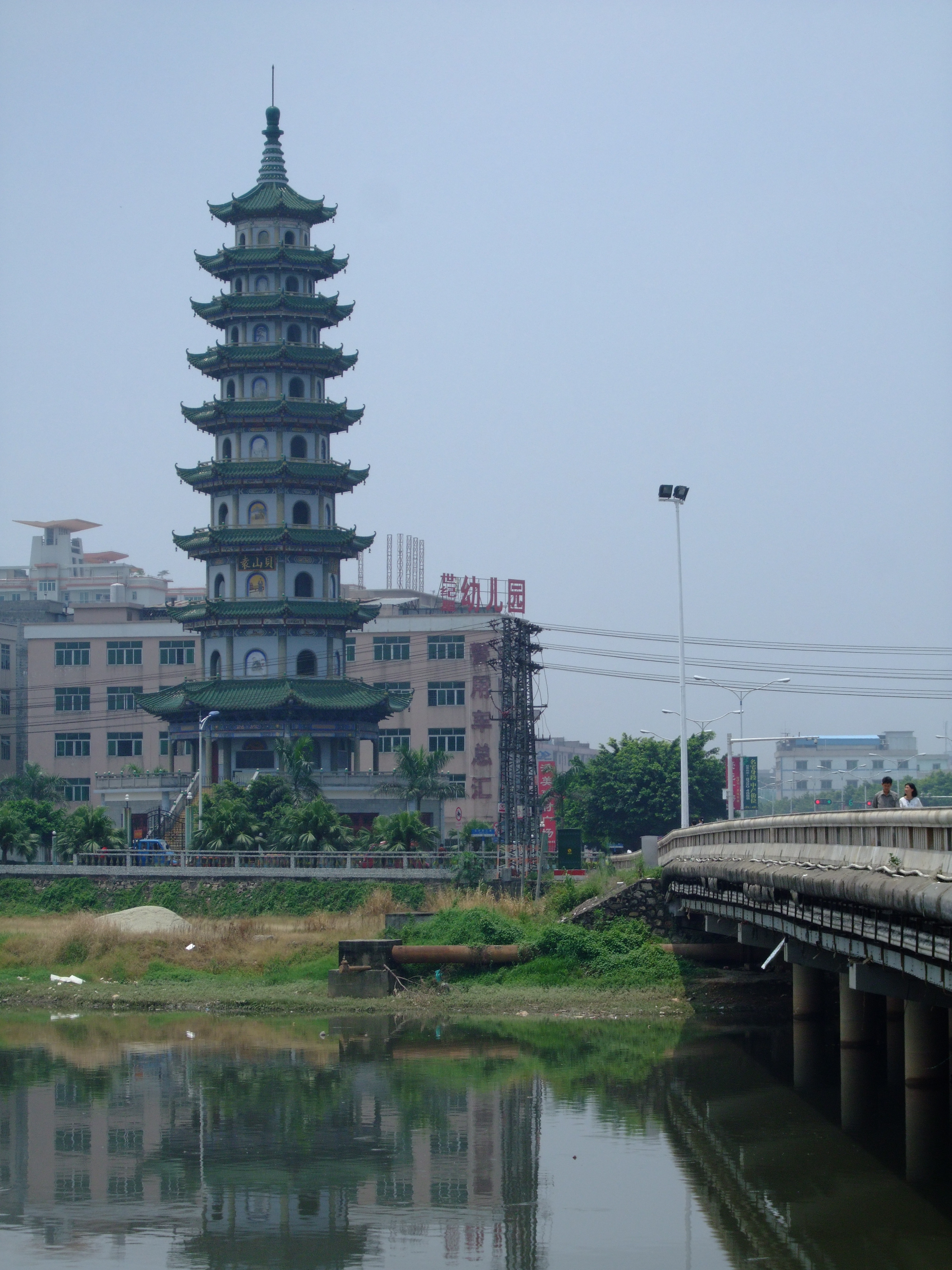 Changping Town, Dongguan, Guangdong China